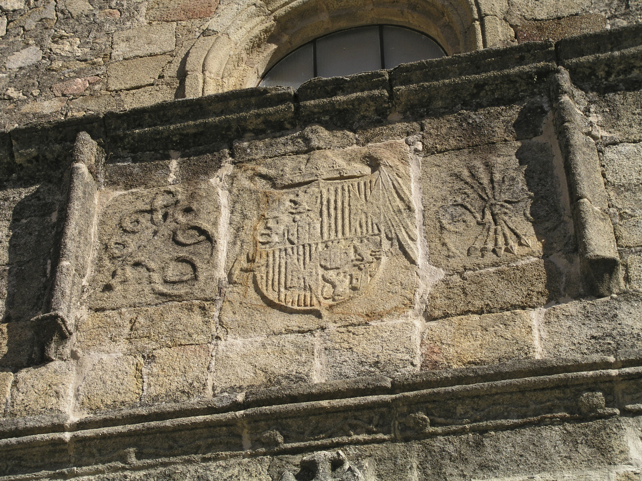 Emblemas de los Reyes Católicos, c. 1500. Iglesia de Santiago, Losar de la Vera (Cáceres, España). 21-octubre-2007.